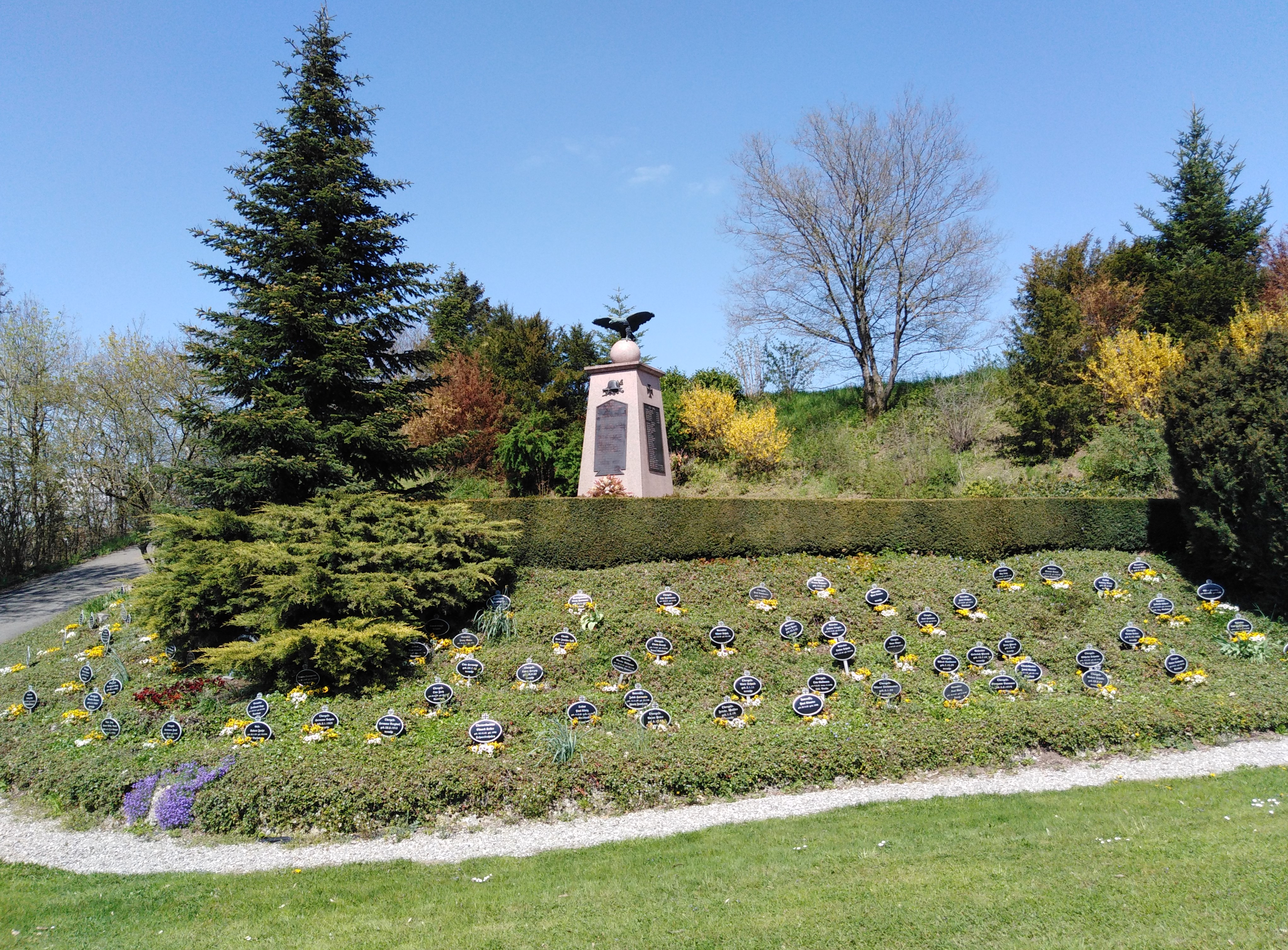 Lauchringen, Gemeinde im Landkreis Waldshut in Baden Württemberg. Das Denkmal für die Gefallenen der Weltkriege aus Oberlauchringen.